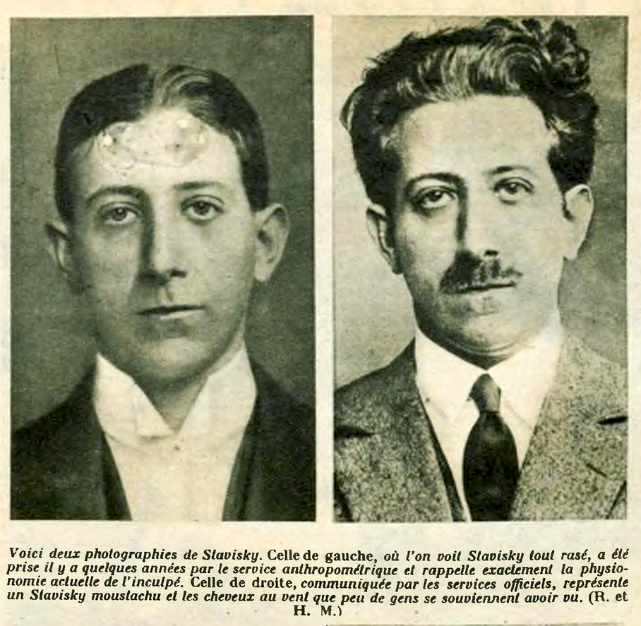 Deux photographies d'identité d'Alexandre Stavisky, datée de la fin des années 1920.